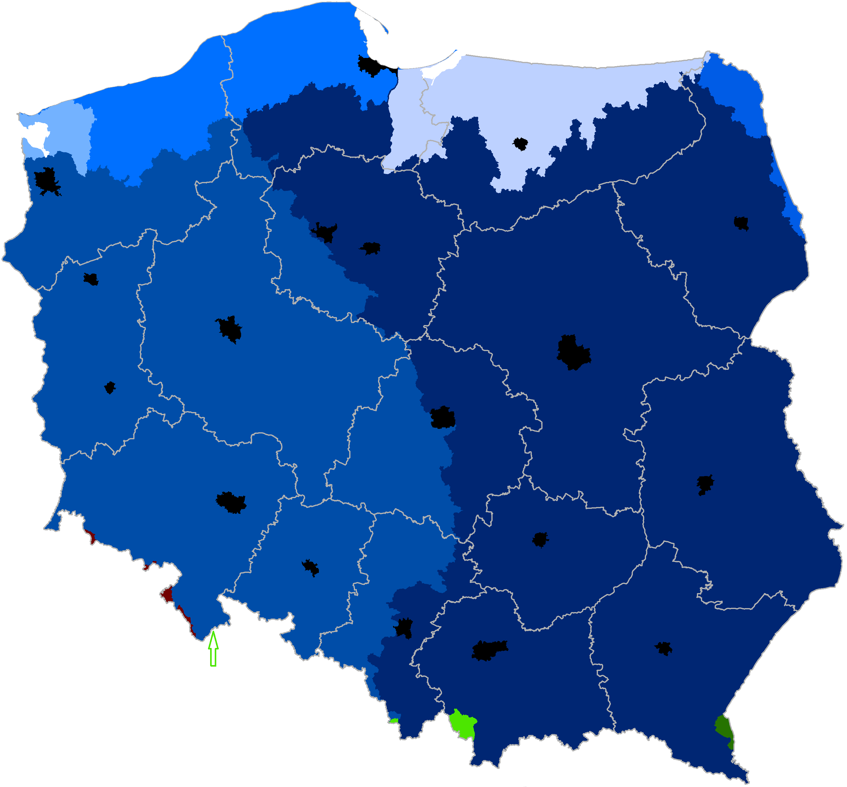 Zlewiska: Morza Bałtyckiego (odcienie niebieskie), Morza Północnego (odcienie czerwone) i Morza Czarnego (odcienie zielone); Dorzecza: Wisły (kolor granatowy), Odry (kolor ciemnoniebieski), Niemna (kolor jasnogranatowy), rzek Zalewu Szczecińskiego (kolor jasnoniebieski), rzek Zalewu Wiślanego (kolor jasnofioletowy), rzek Przymorza (kolor niebieski), Łaby (kolor ciemnoczerwony), Dunaju (kolor zielony), Dniestru (kolor ciemnozielony). Linie jasnoszare - granice państwa i województw; pola czarne - miasta wojewódzkie